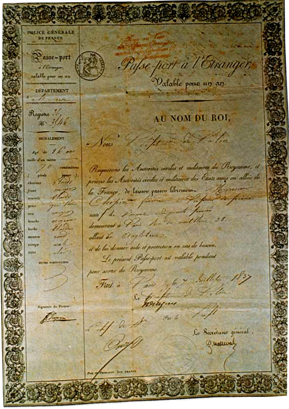 Visum von Chopin